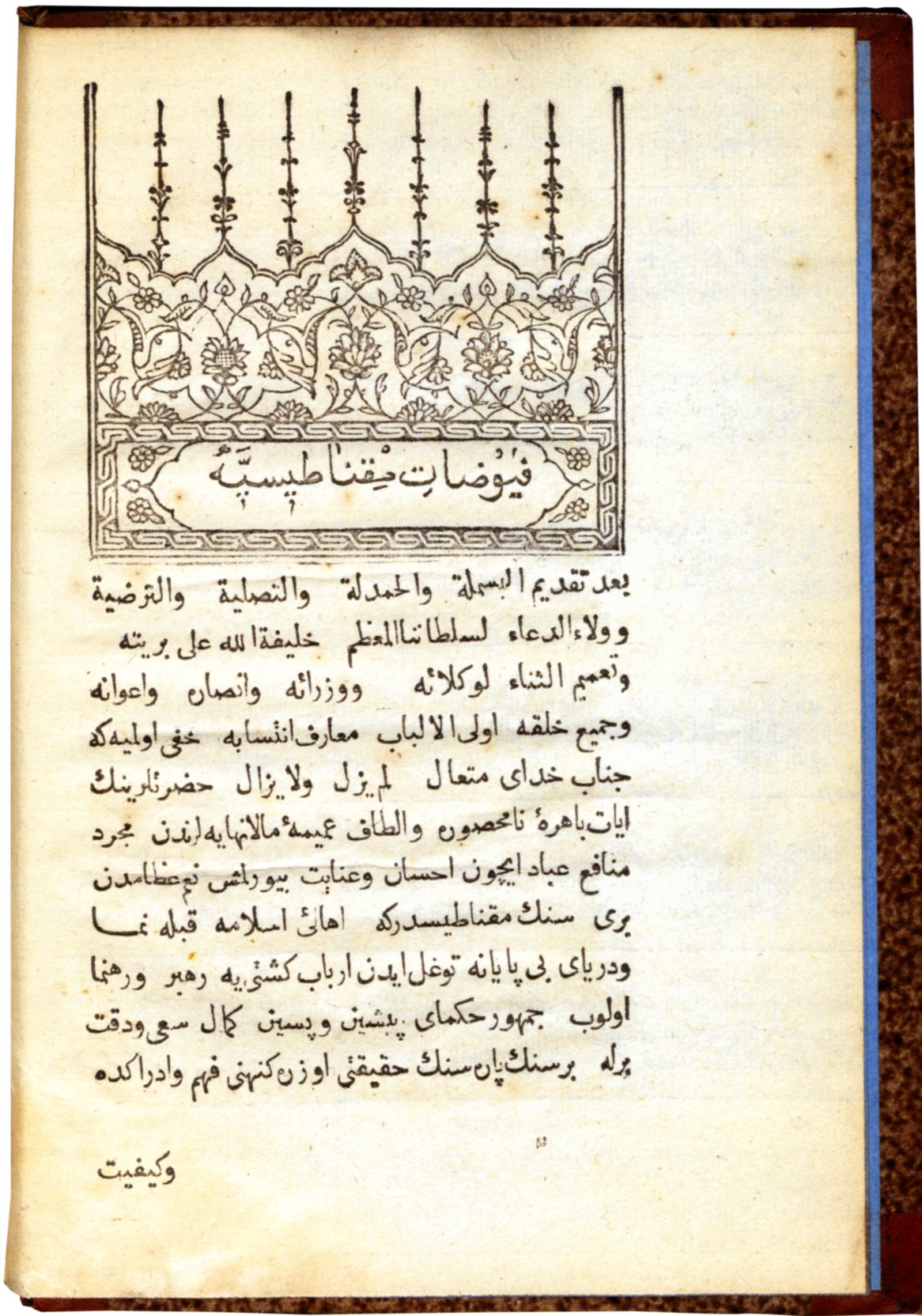 Ibrahim Müteferriqa: Fayudat-i miqnatisiye (Abhandlung über Magnetismus). Istanbul: Ibrahim Müteferriqa, 1732 (Wien, Österreichische Nationalbibliothek 21.227 B. Alt-Mag. S. 1)